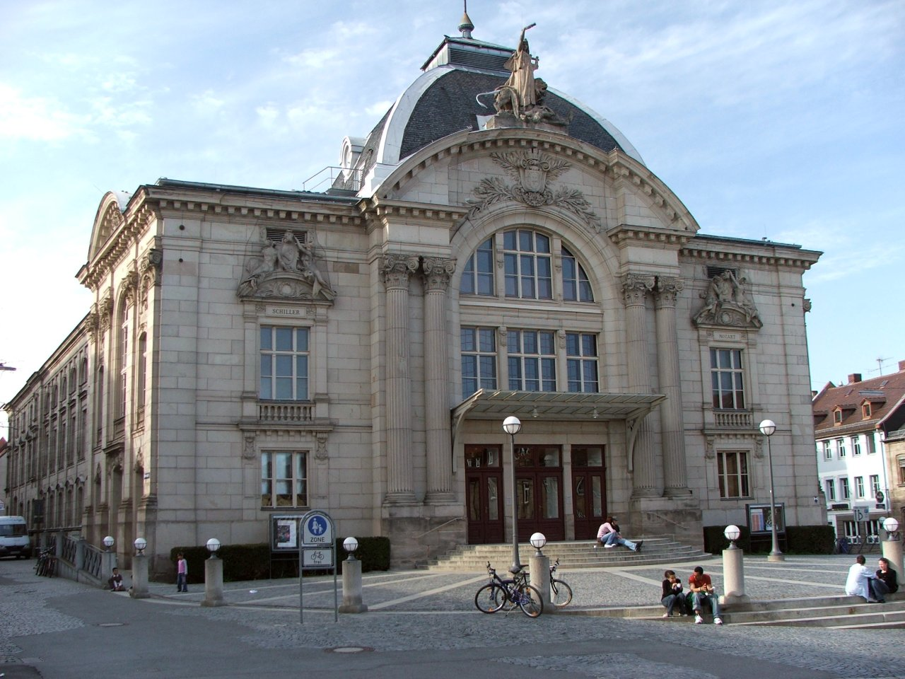 Stadttheater in Fürth/Deutschland